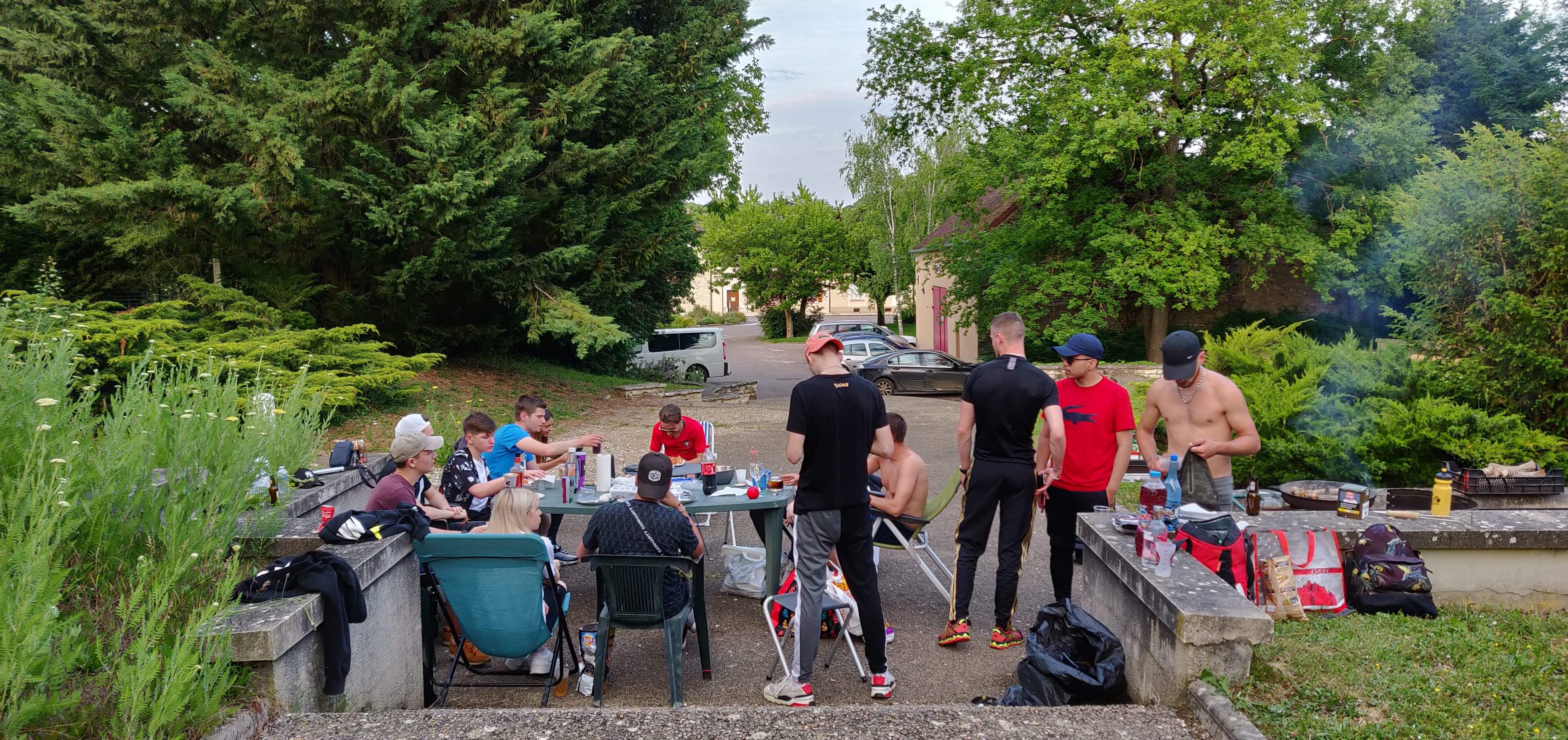 Seyrica